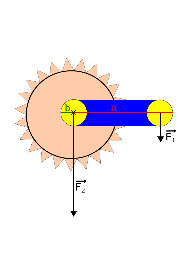 Tento fyzikální náčrtek znázorňuje síly a ramena při používání kliky.